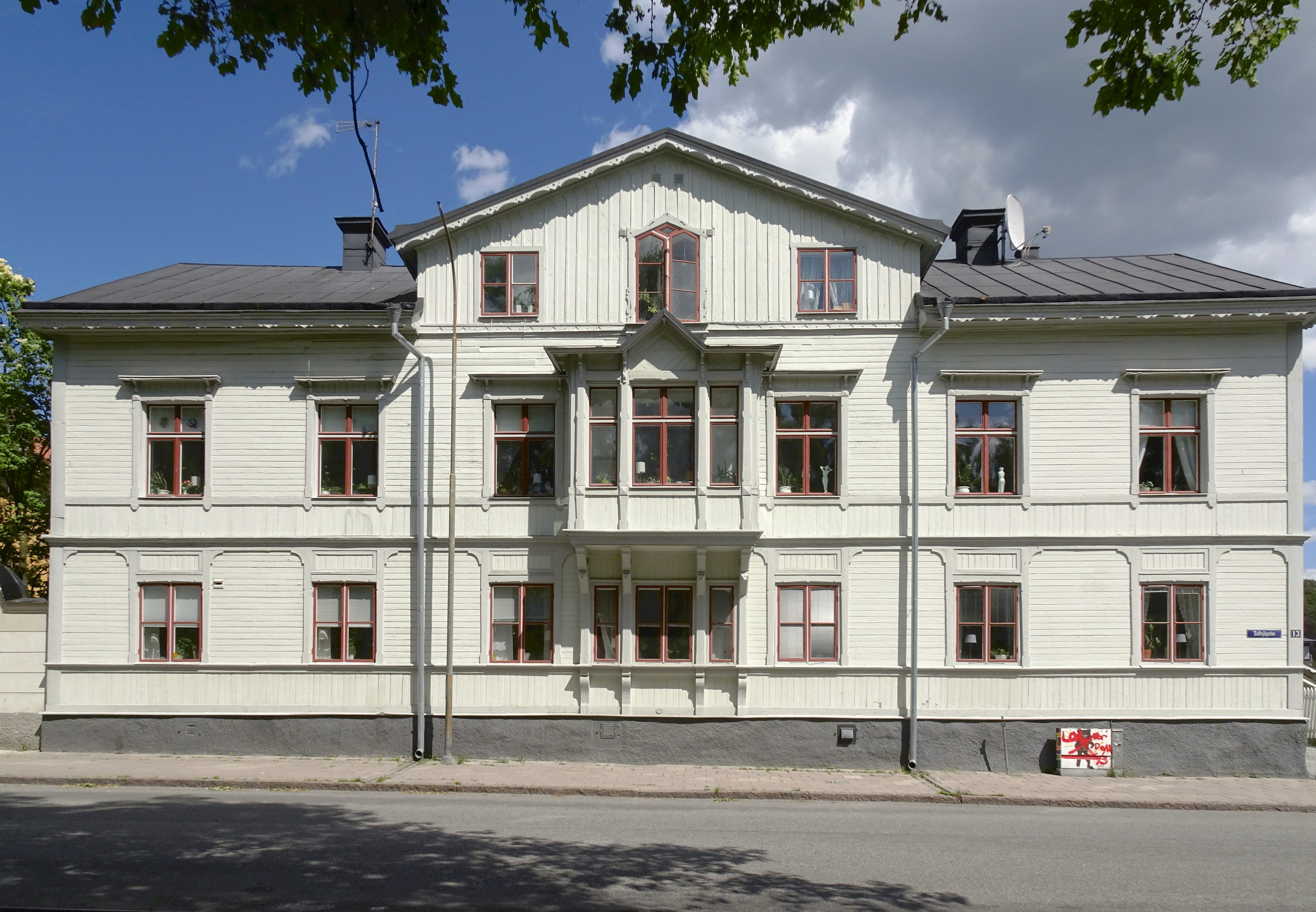 Kvarteret Skytten 2, Saltsjögatan 13. Troligen en av Södertäljes äldsta flerfamiljshus i trä. Byggnaden är uppförd 1854 i tidstypisk panelarkitektur. Enligt kommunen har byggnaden, med uthus och trädgård, ett stort arkitektoniskt och miljöskapande värde.